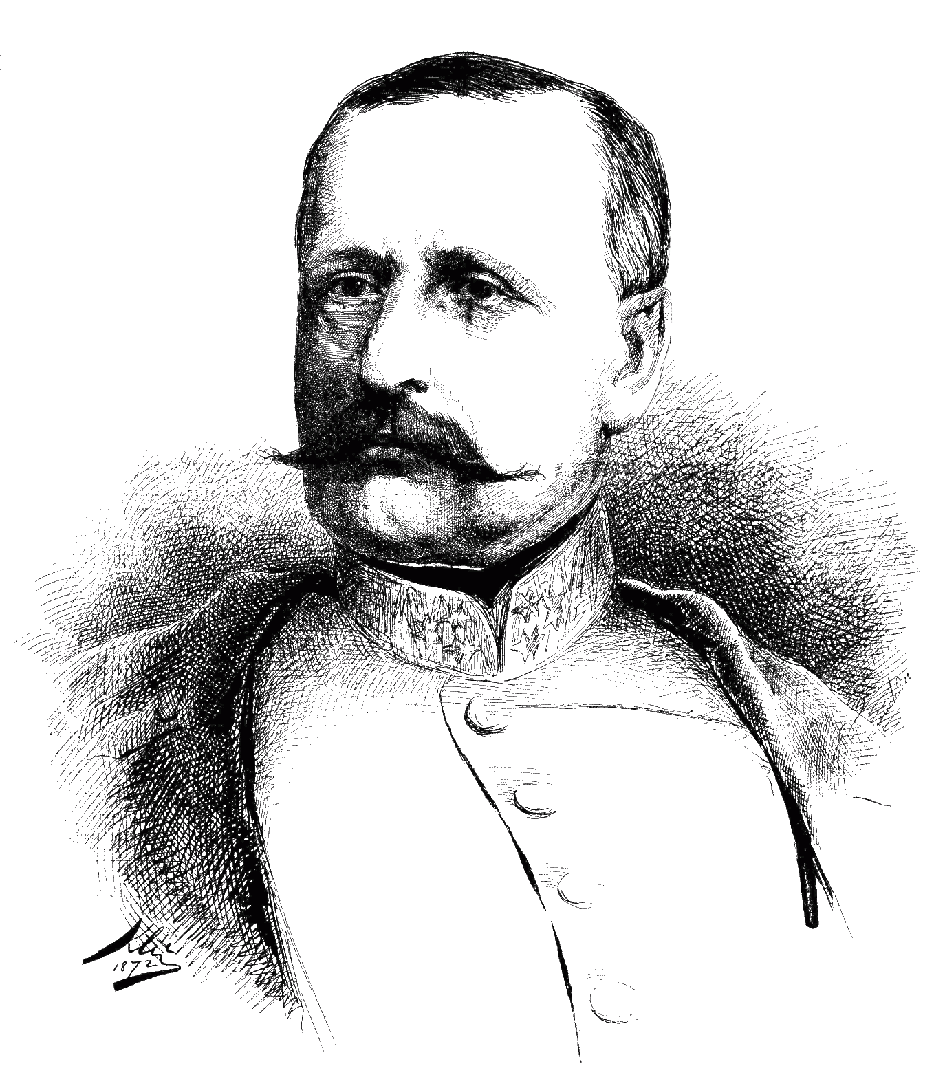 Alexander Freiherr von Koller (1813-1890), Austrian-Hungarian politician and general